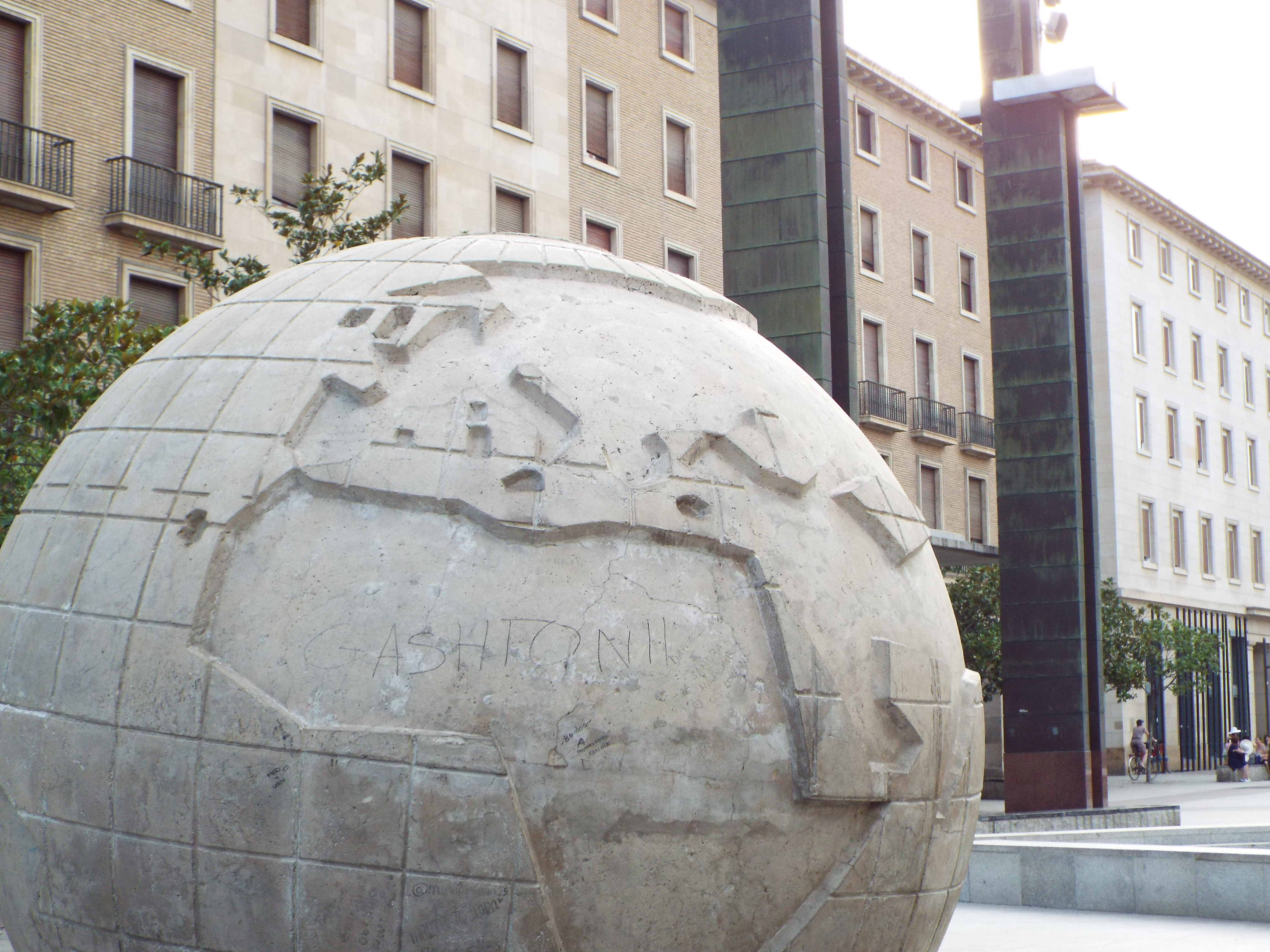 Globo terráqueo en la Plaza del Pilar de Zaragoza